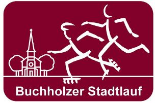 Logo des Buchholzer Stadtlaufs. Die Farbe ändert sich jährlich